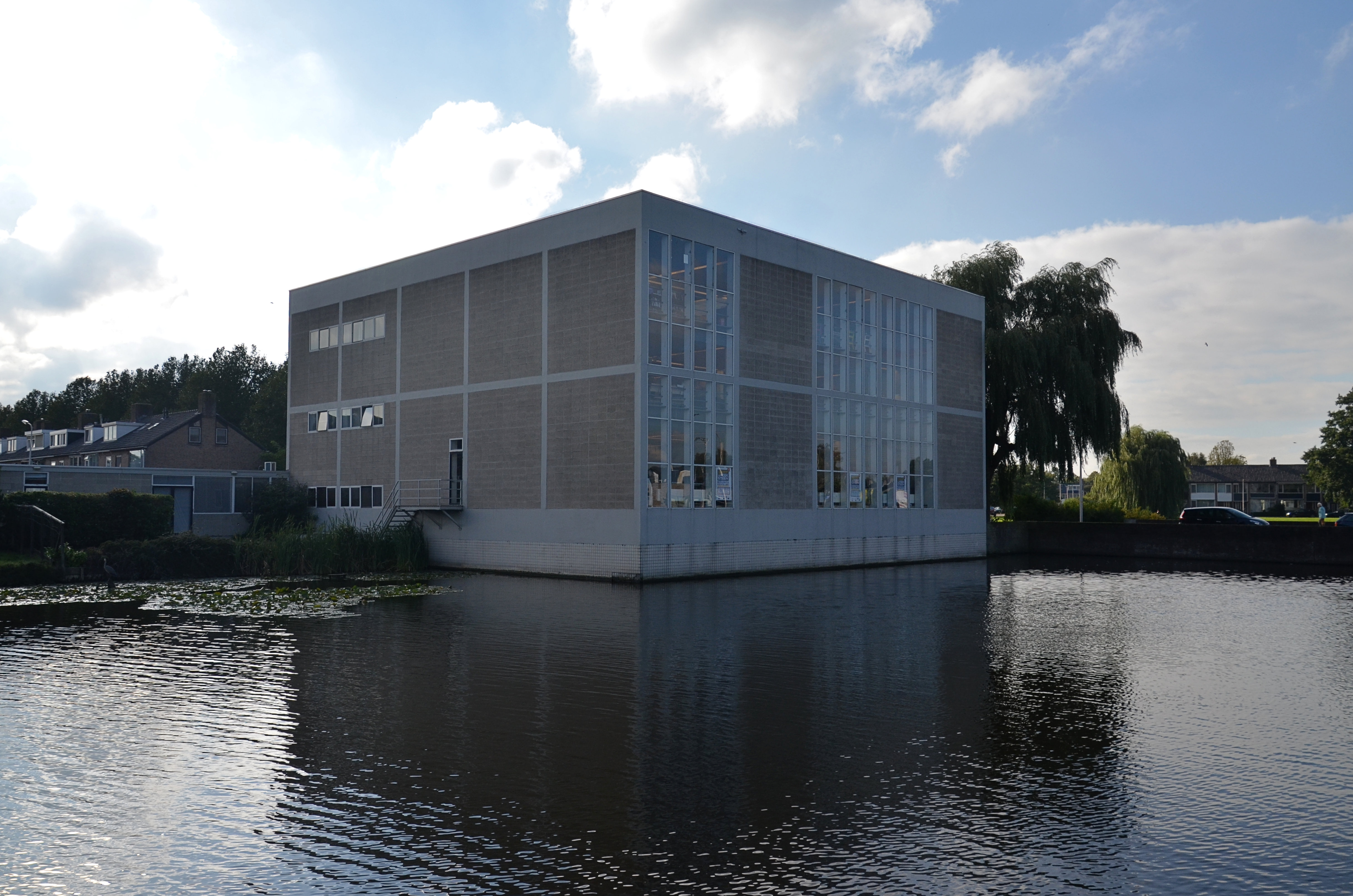 Voormalig kerkelijk centrum "De Hoeksteen" Alfons Ariënslaan 1 Uithoorn. Architect: Gerrit Rietveld